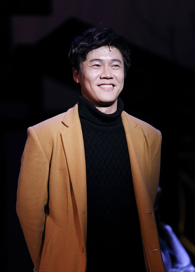 150124 뮤지컬 러브레터 박호산